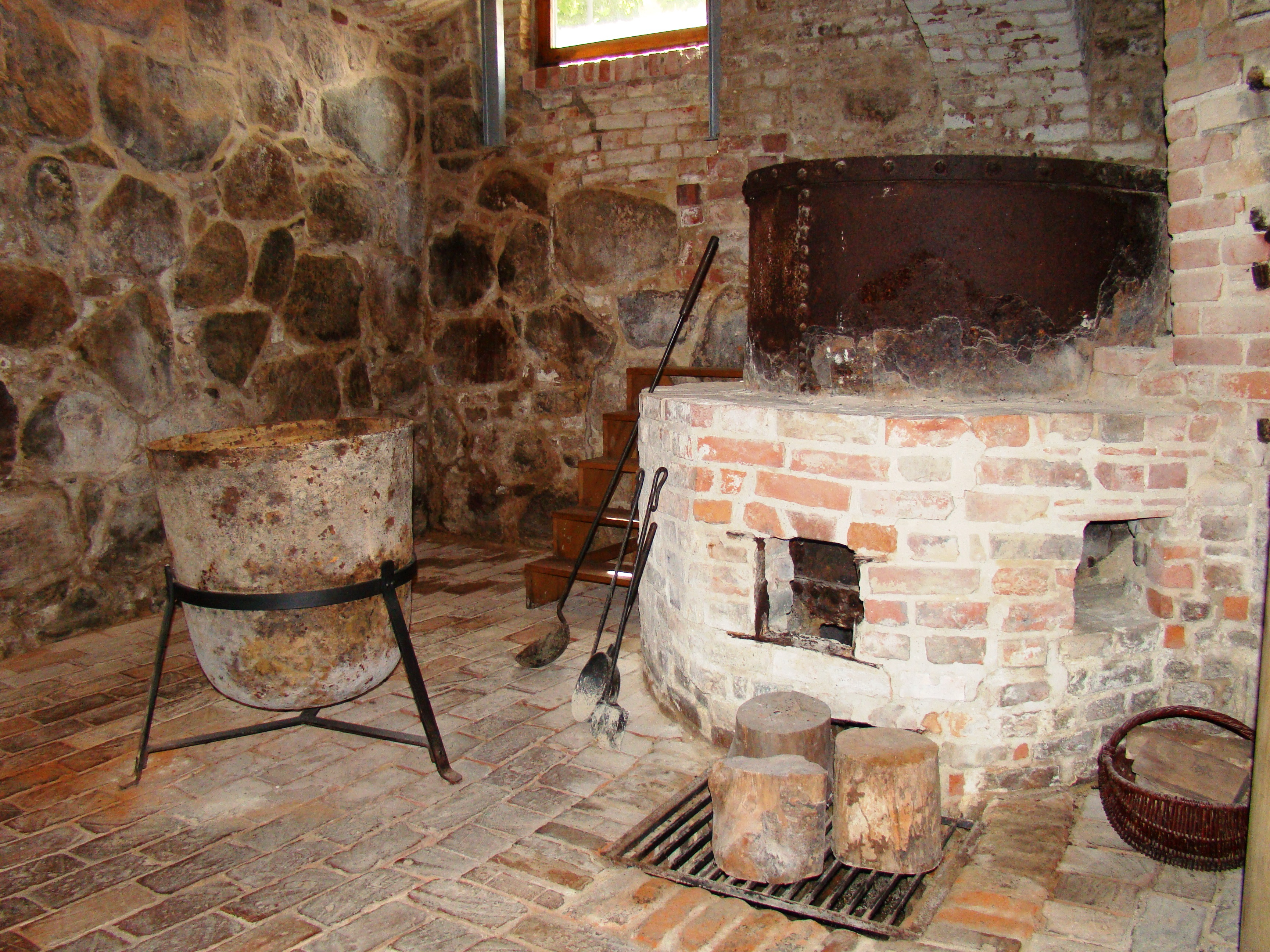 Schauwerkstatt im Caspar-David-Friedrich-Zentrum Greifswald, 2014